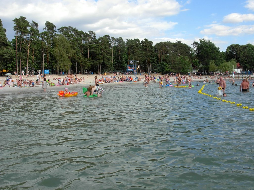 Plaża w Przyjezierzu